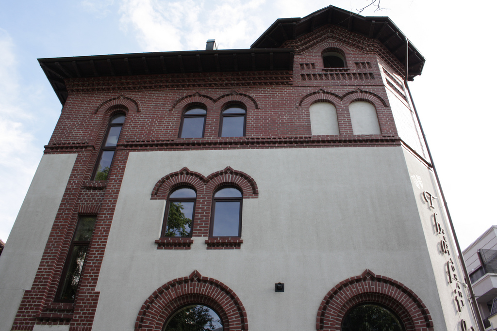 Casă - Str. Sevastopol 8 sector 1